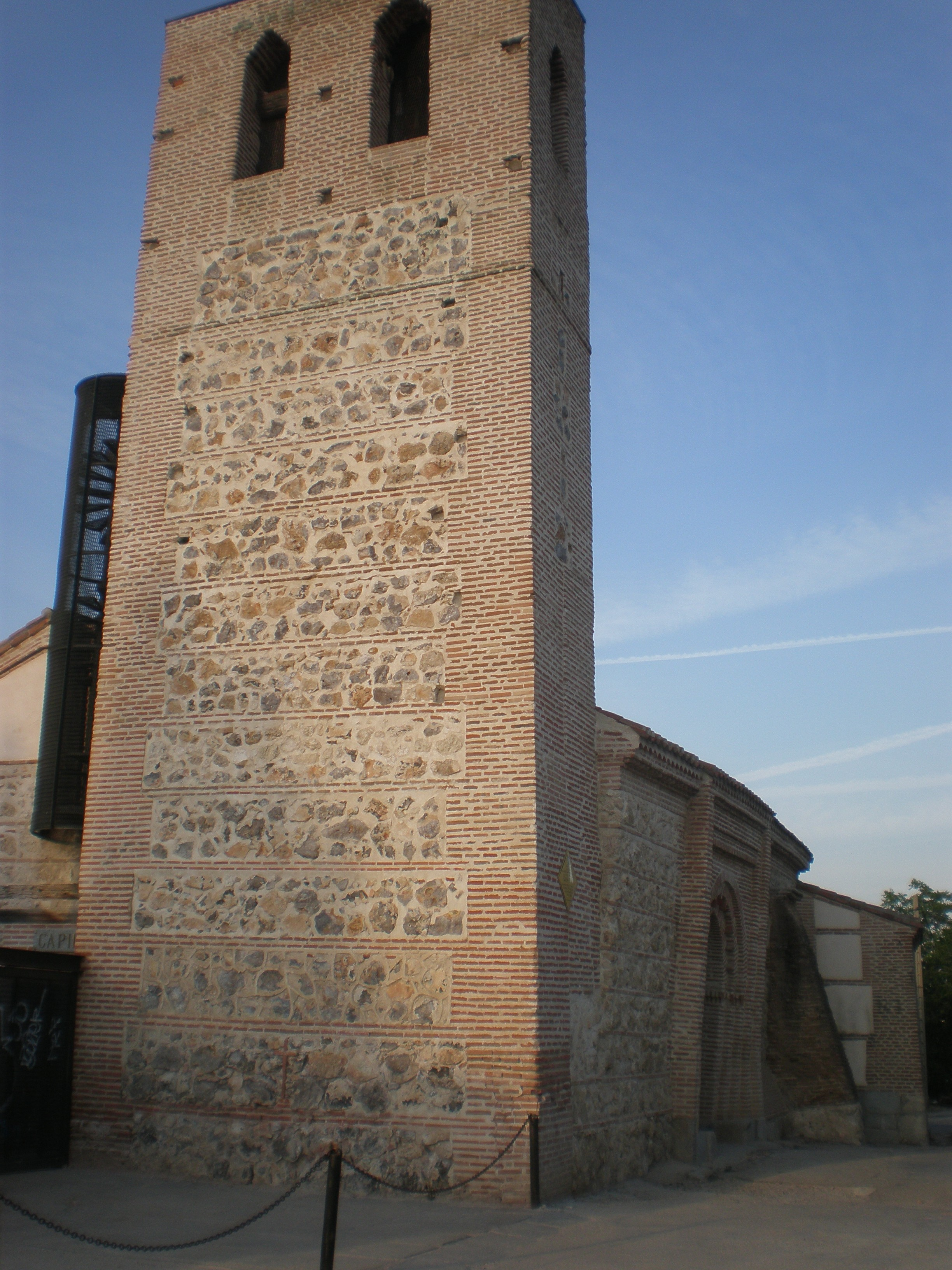 Torre de la ermita de Santa María la Antigua (Madrid)